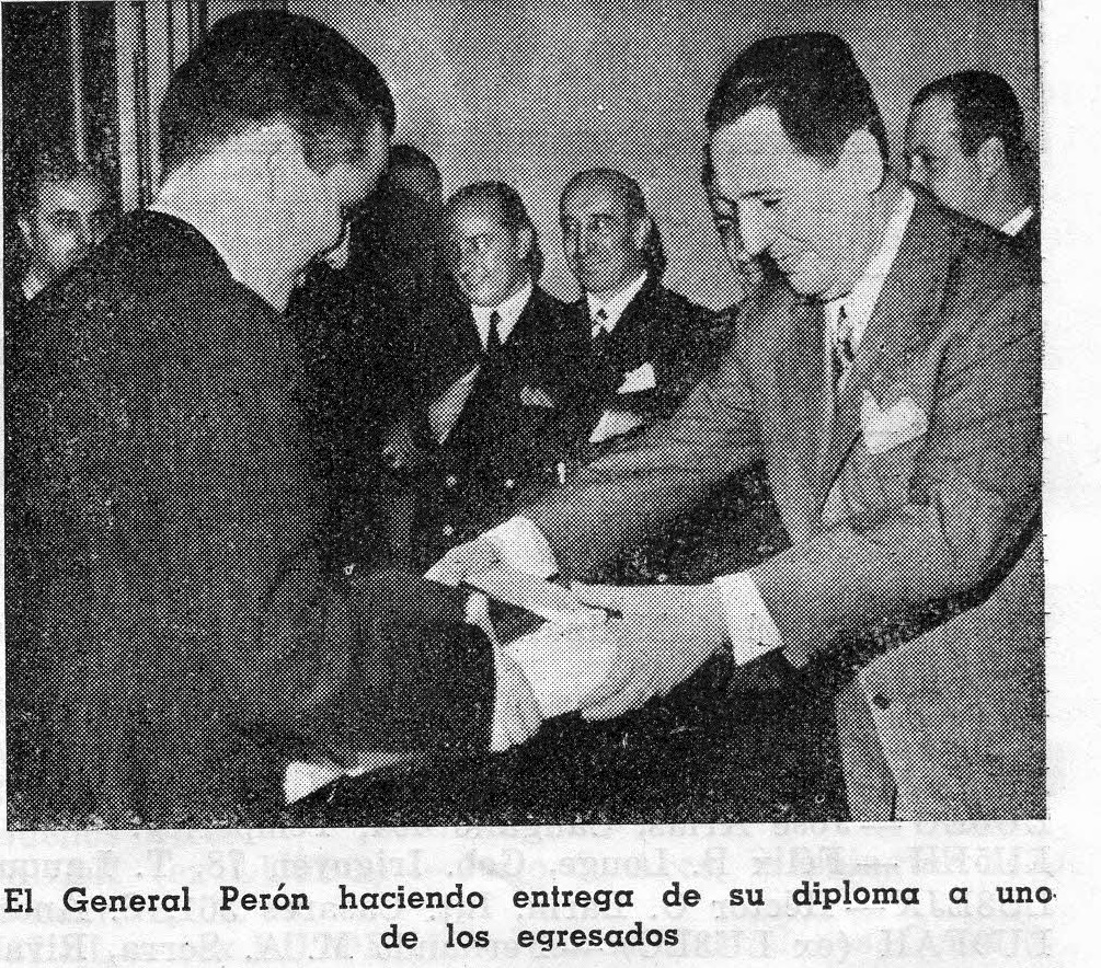 El Presidente de la República Argentina, el Gral. Juan Domingo Peron, hace entrega de los diplomas de los primeros Ingenieros en Telecomunicaciones de la Universidad de Buenos Aires. 6/5/1950